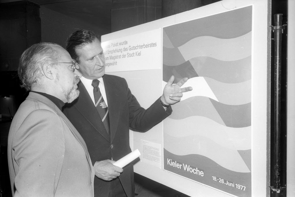 Oberbürgermeister Günther Bantzer (rechts) und Hermann Bentele (links), Dozent an der Fachhochschule für Gestaltung und Mitglied des Gutachterbeirates, stellen das Kieler Woche-Plakat 1977 vor. Das Motiv ist ein rotes Dreieck, das auf den Wellen tanzt.